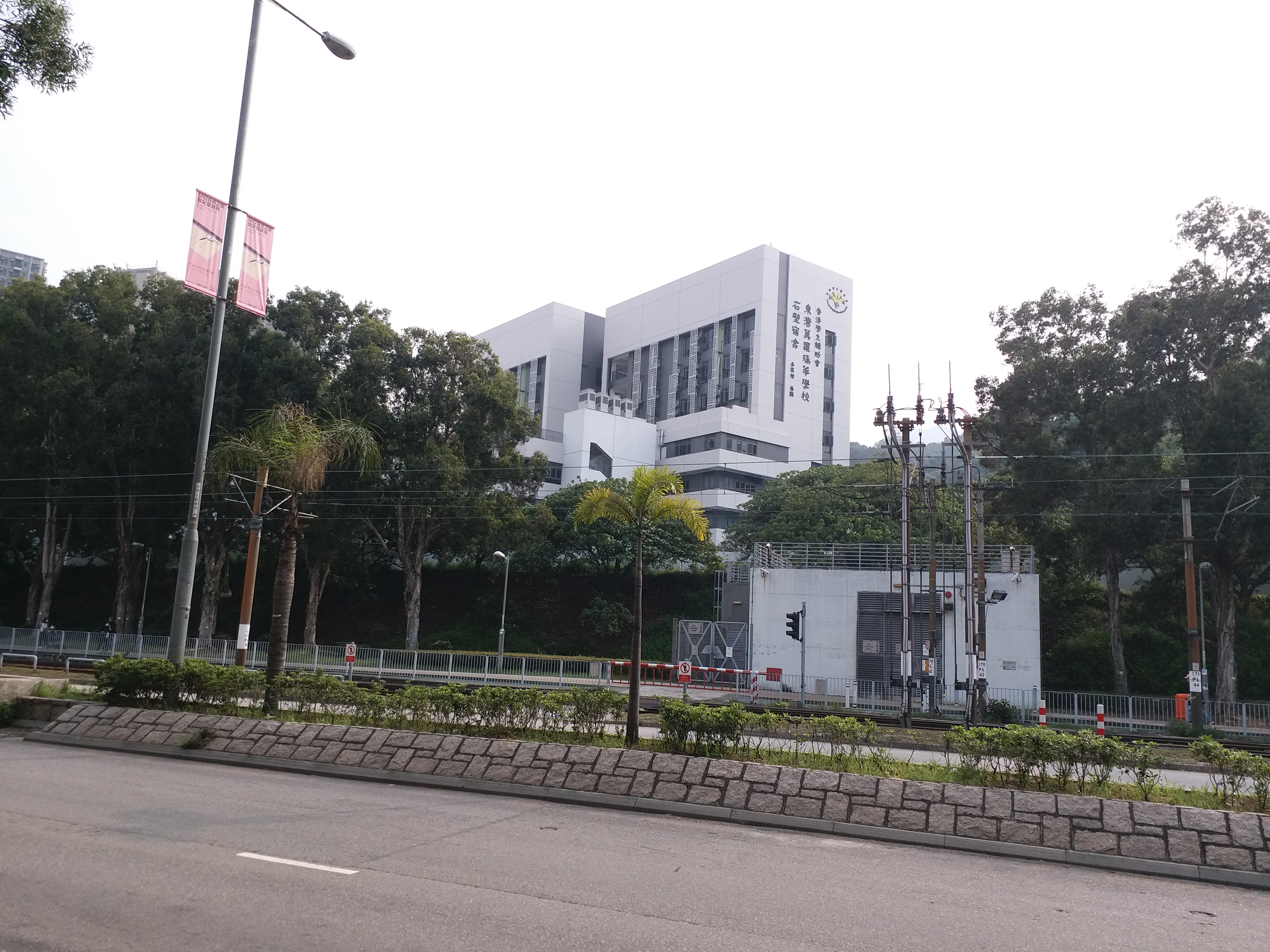 東灣莫羅瑞華學校東面校舍